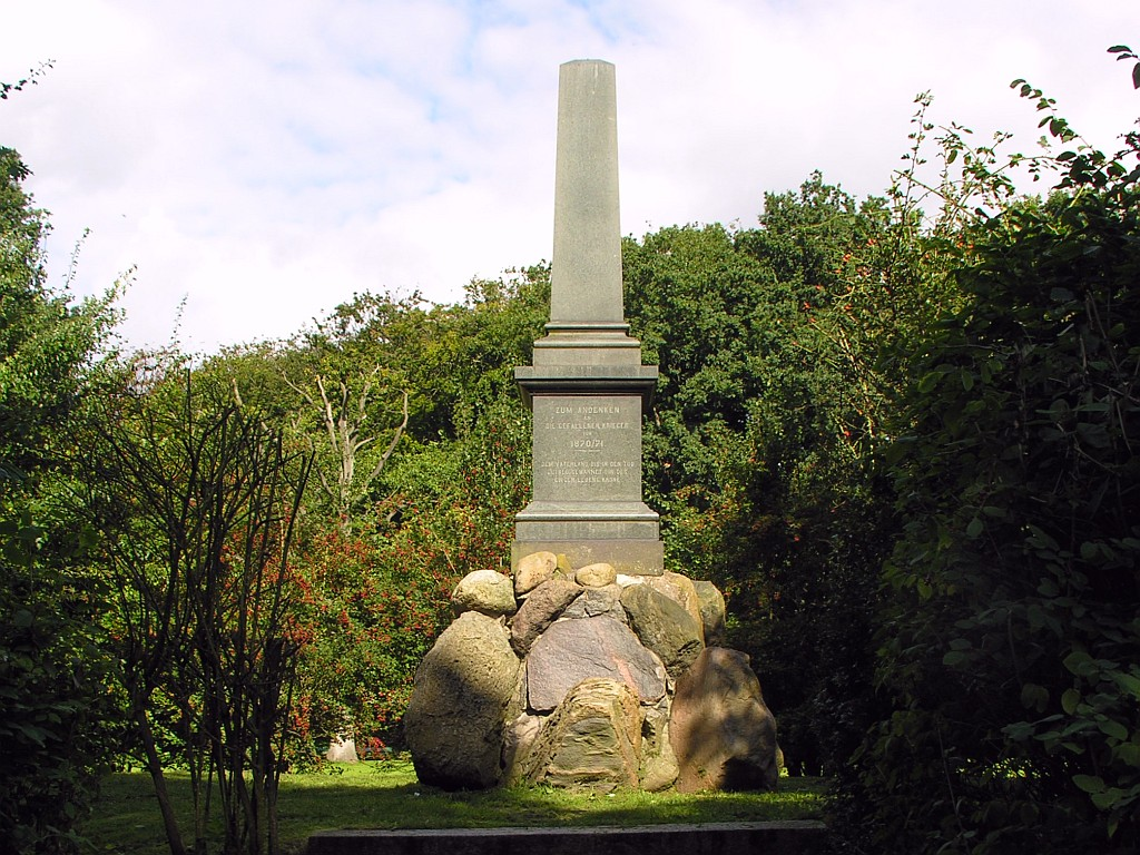 Husum Ehrenmal Schlosspark für die 1870-71 Gefallenen Foto 2007 Wolfgang Pehlemann Wiesbaden DSCN6218